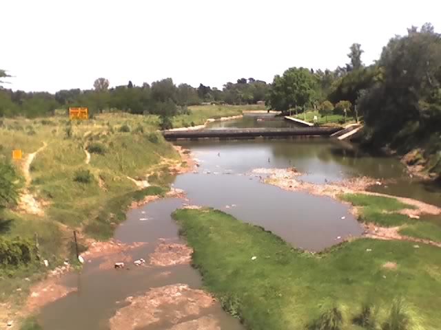 Dique Cascallares, Río Reconquista, Provincia de Buenos Aires.